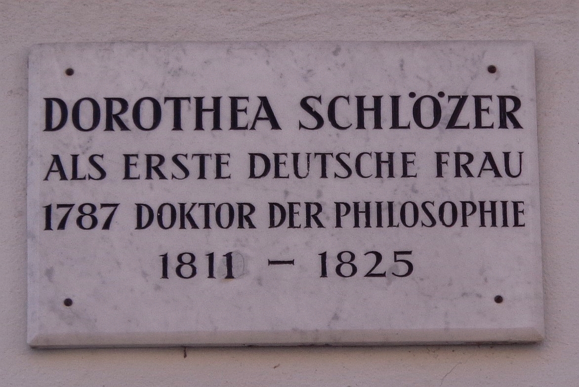 Göttinger Gedenktafel für Dorothea Schlözer (Lange Geismarstraße 49)